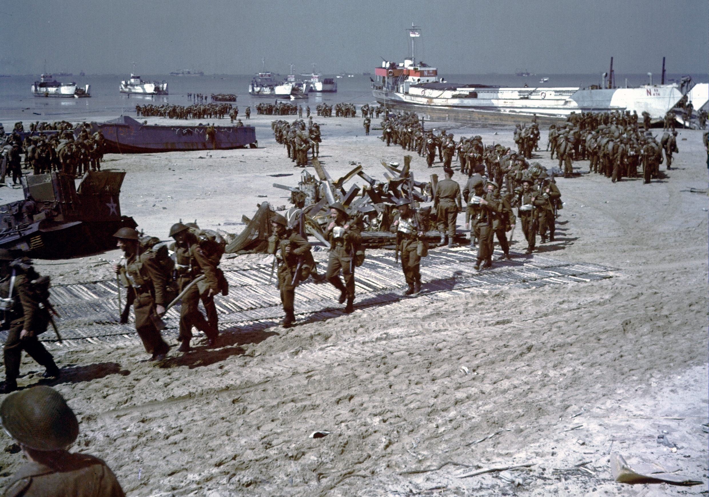 Vue générale de la plage de Juno Beach . Une multitude de soldats de l'infanterie canadienne est en train de débarquer sur les plages de Juno Beach.